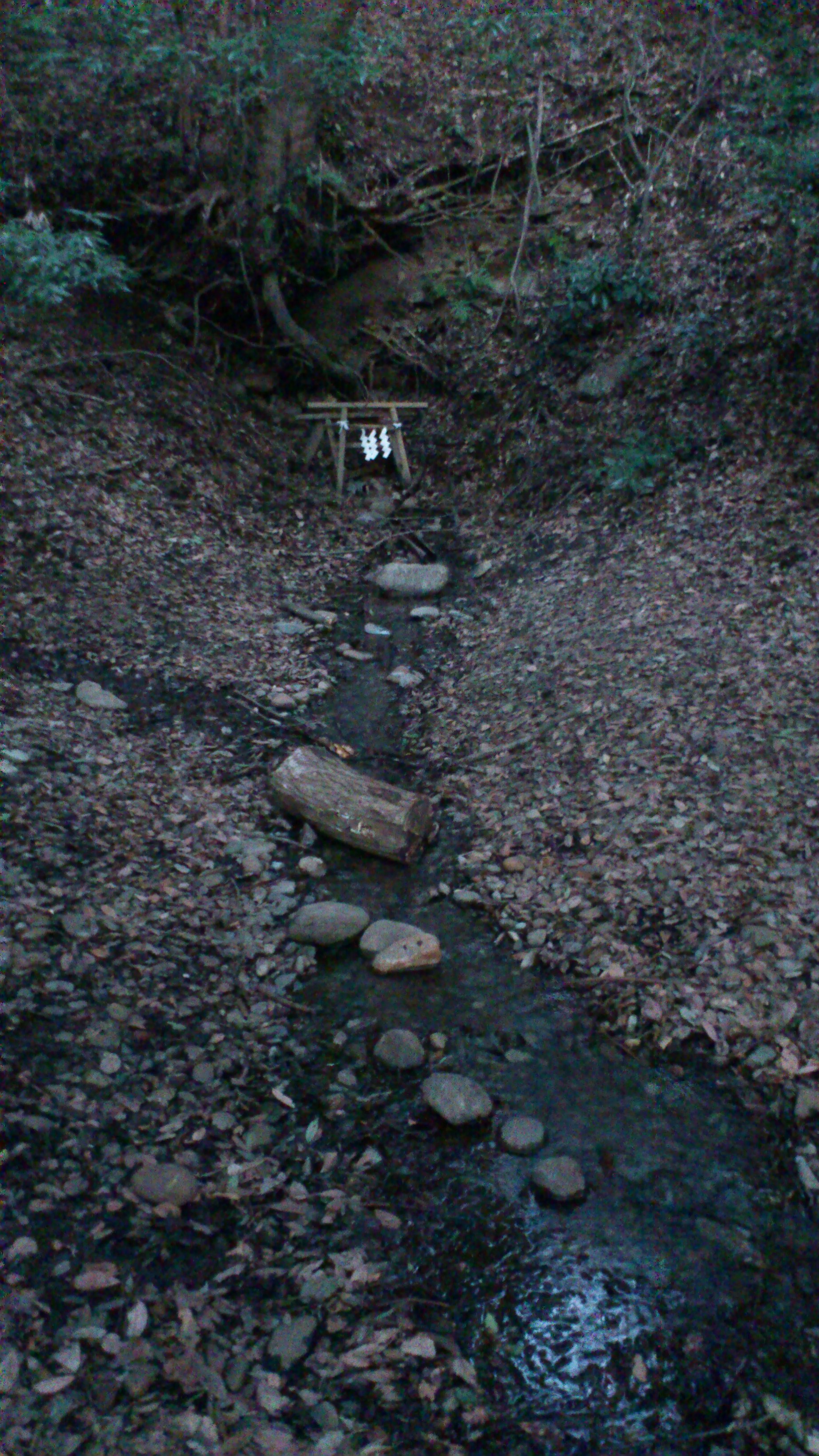 神奈川県相模原市南区磯部に鎮座する有鹿神社奥宮の奥にある水源。この上方の丘陵は勝坂遺跡。神社の本宮は海老名市上郷にある。